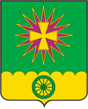 Coat of Novovelichkovskoe